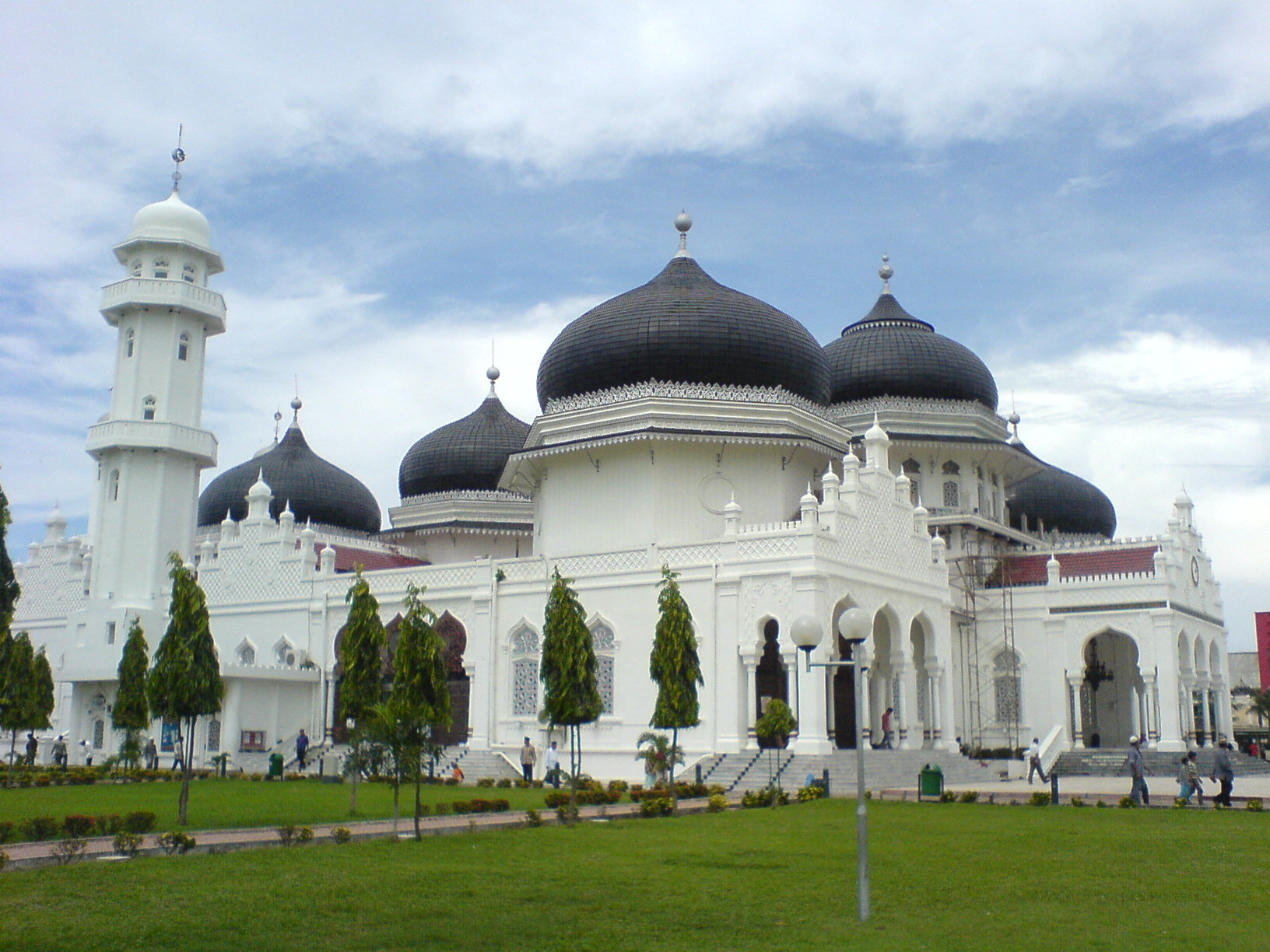 Masjid Baiturrahman